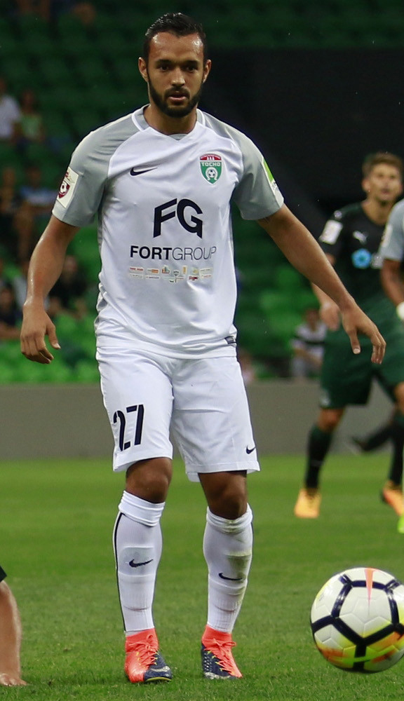 «Краснодар» - «Тосно»